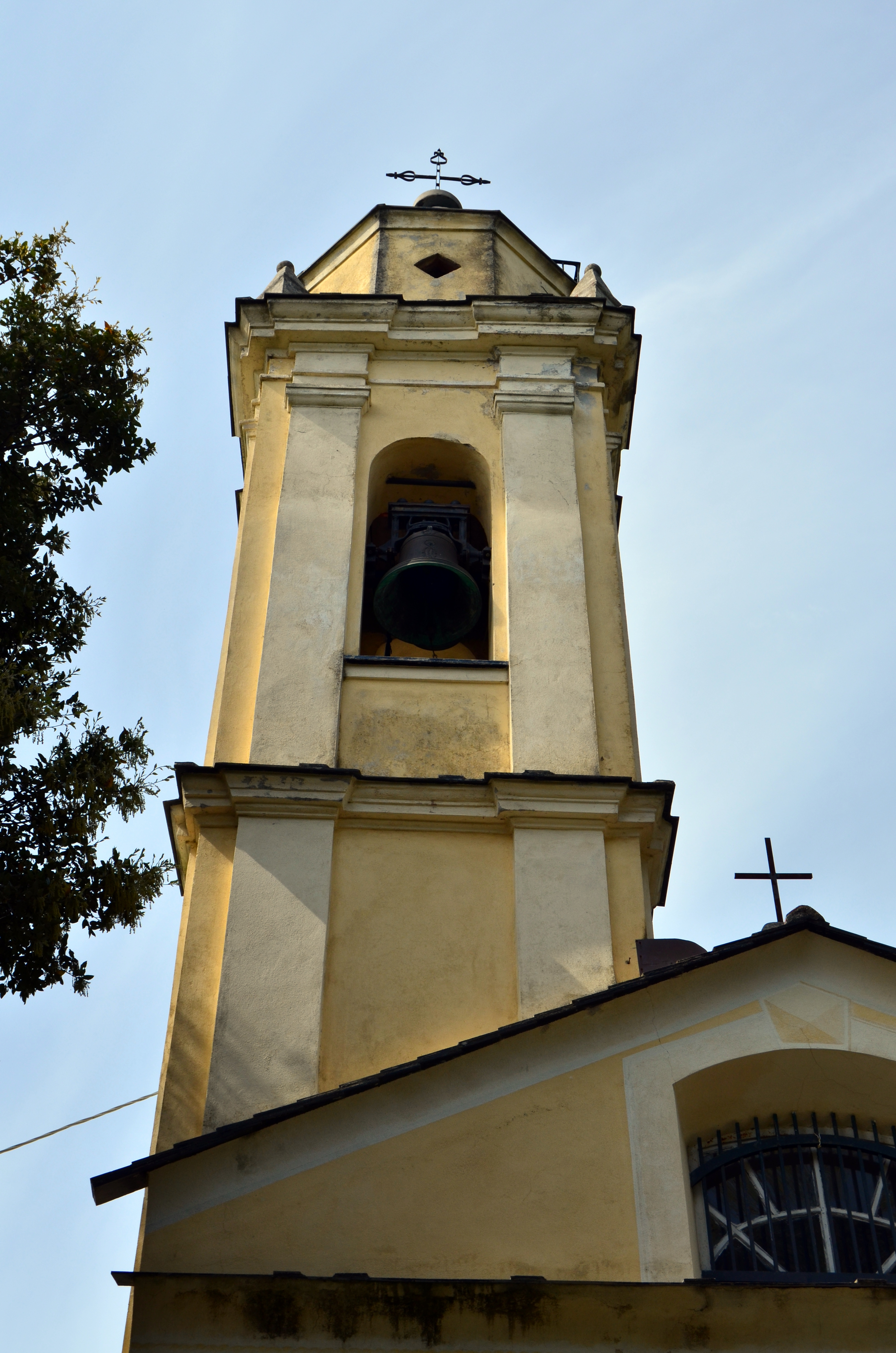 Santuario di Nostra Signora della Misericordia, Missano, Castiglione Chiavarese, Liguria, Italia